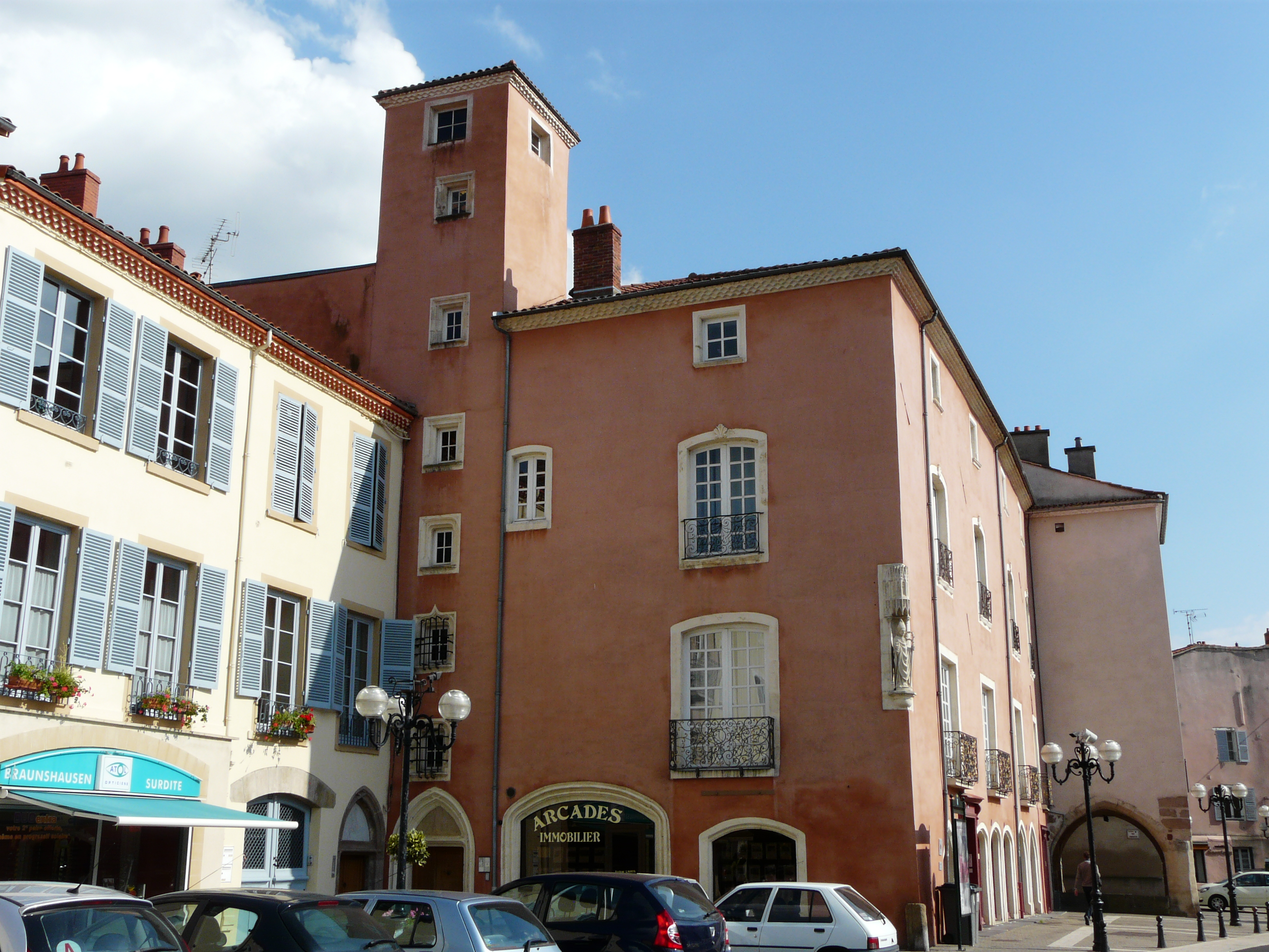 L'hôtel Clément, place de la République, Issoire, Puy-de-Dôme, France.